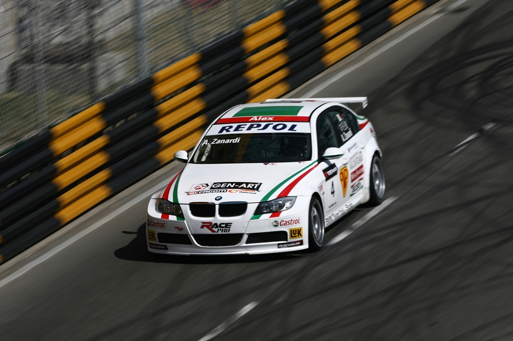 Alessandro Zanardi racing his BMW 320si at Macau Guia in 2008